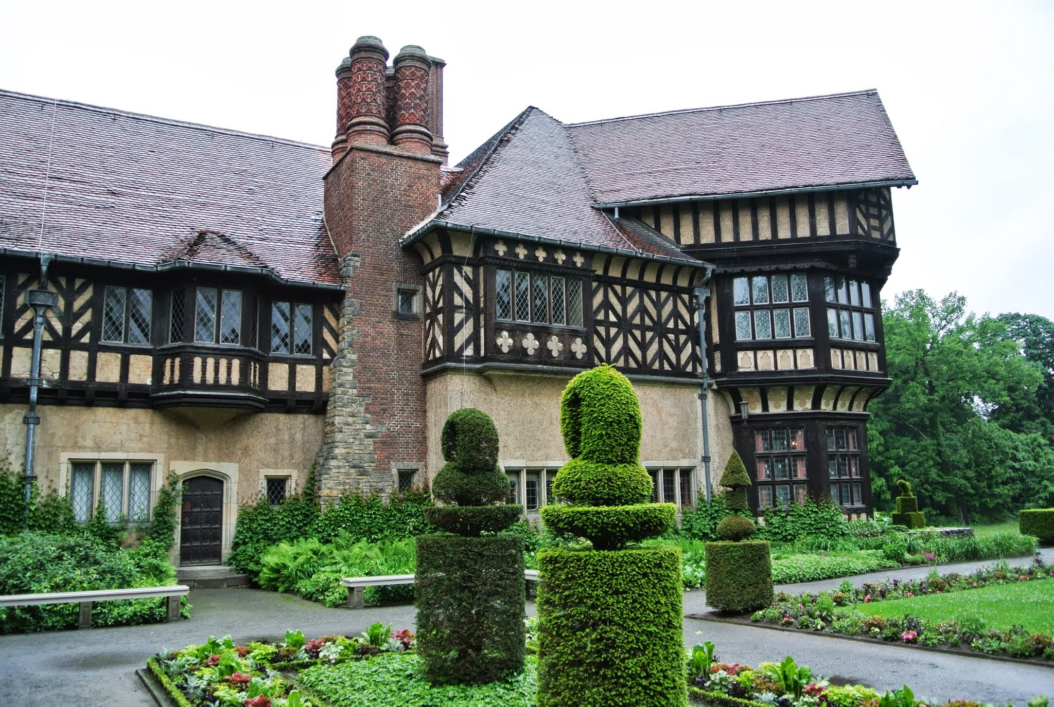 Potsdam, Schloss Cecilienhof